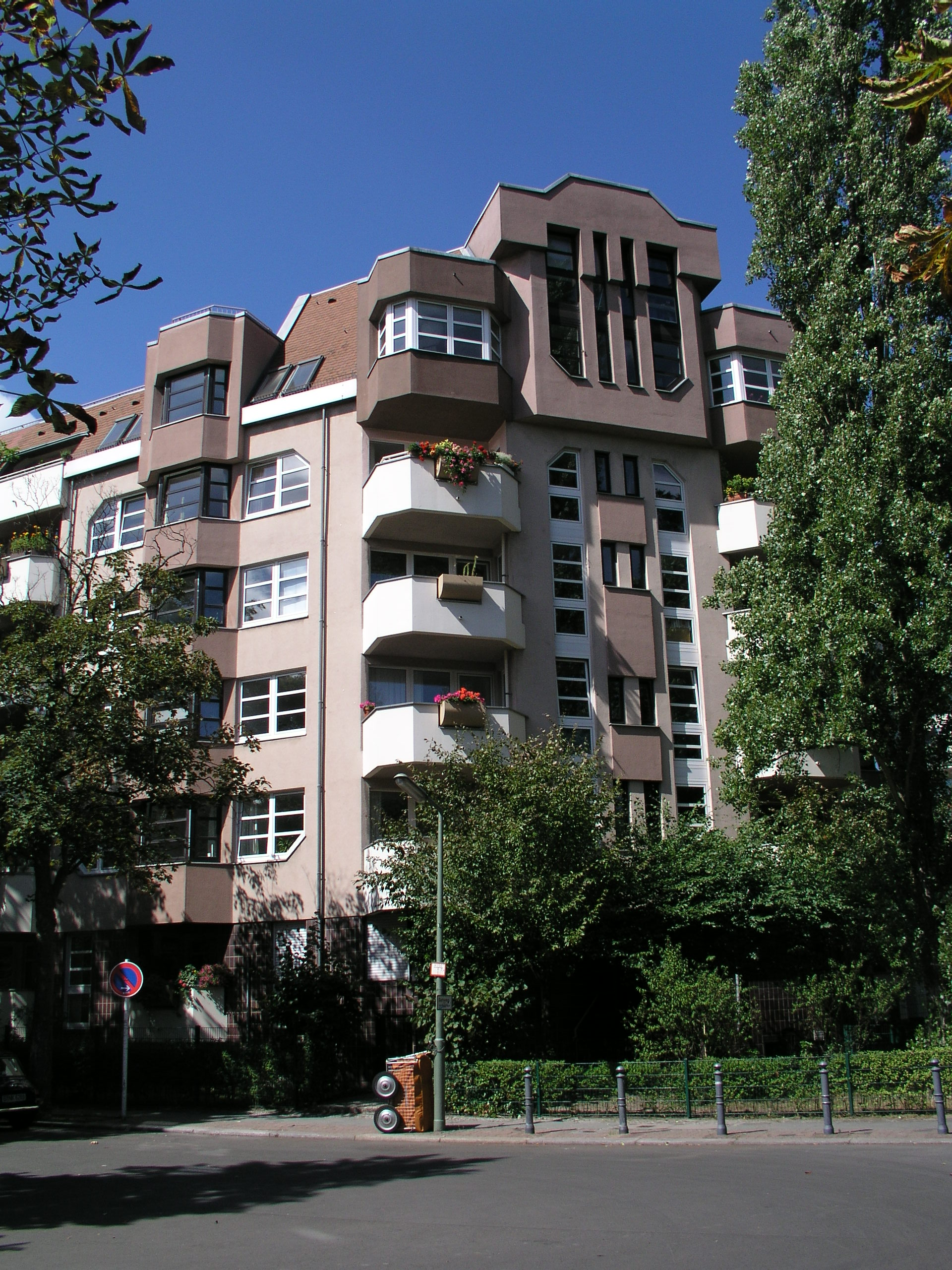 Anliegerstraße zum Perelsplatz